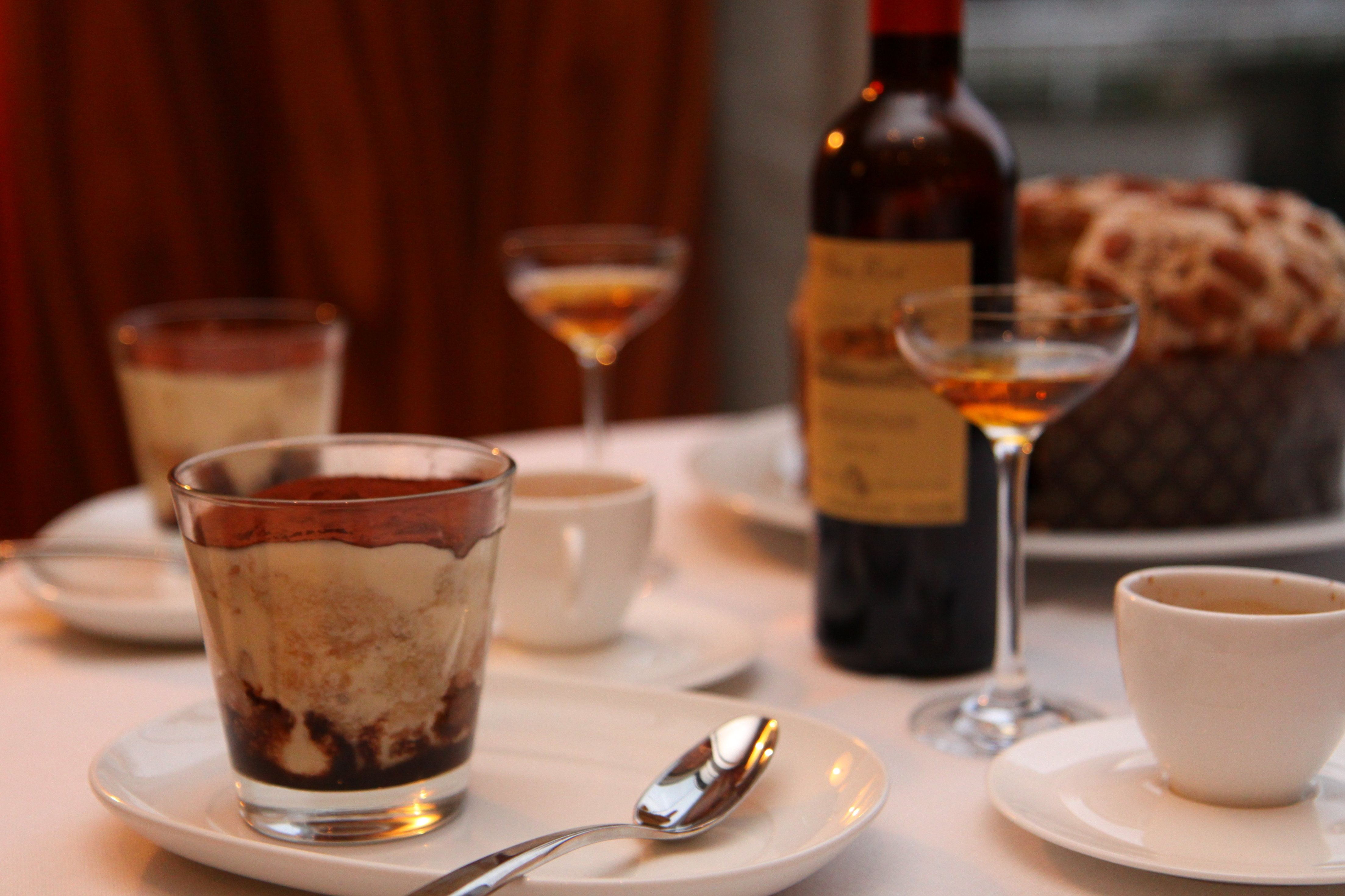 tiramisu, panettone, espresso and passito.